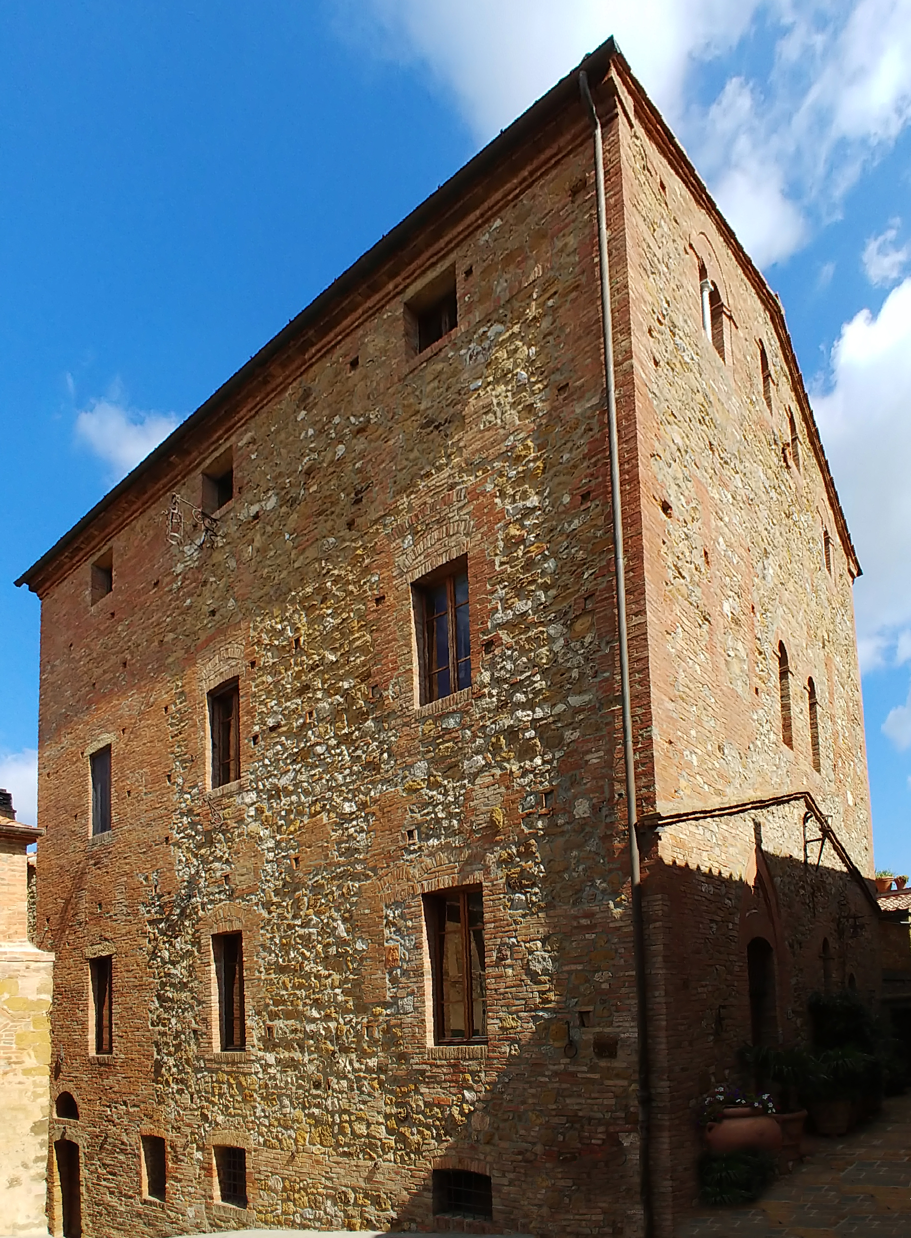 Esterno.